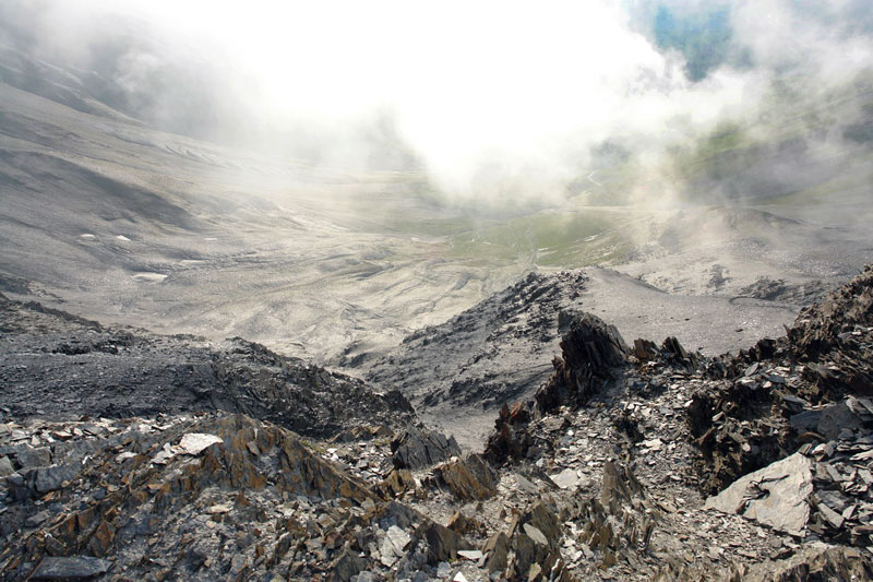 აწუნთა Georgia, Khevsureti/Tusheti